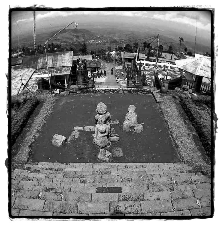 Candi Ceto (Cetha) berada diperbukitan lereng Gunung Lawu perbatasan Jawa Tengah dan Jawa Timur. [rovitavare]